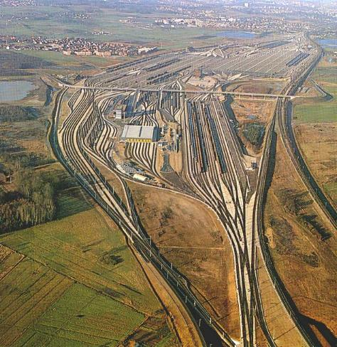 Maschen Rangierbahnhof, Blick nach Nordwesten. In Bildmitte links der See im Maschener Moor, im Hintergrund links der Bahn der Pulvermühlenteich, rechts am Bildrand der See im Großen Moor